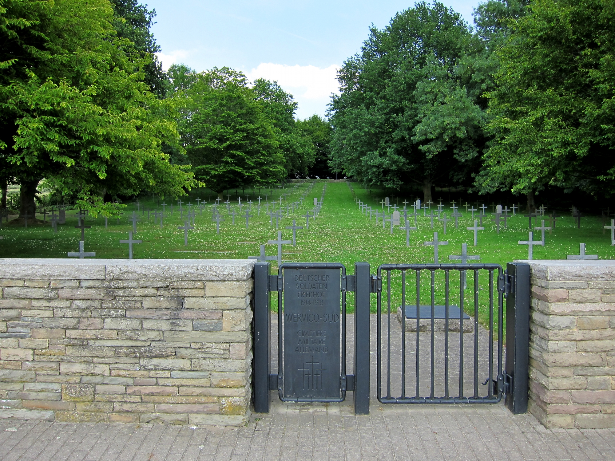 Le cimetière allemand de Wervicq-Sud (Nord).